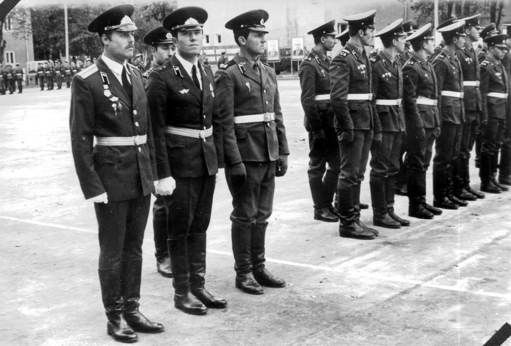 Soldaten der 21. Garde-Motorisierten-Schützen-Division der Gruppe der Sowjetischen Streitkräfte in Deutschland in Perleberg in den frühen 1980er-Jahren.